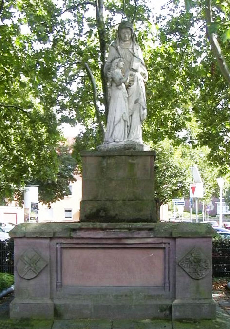 Annasaeule in Dueren